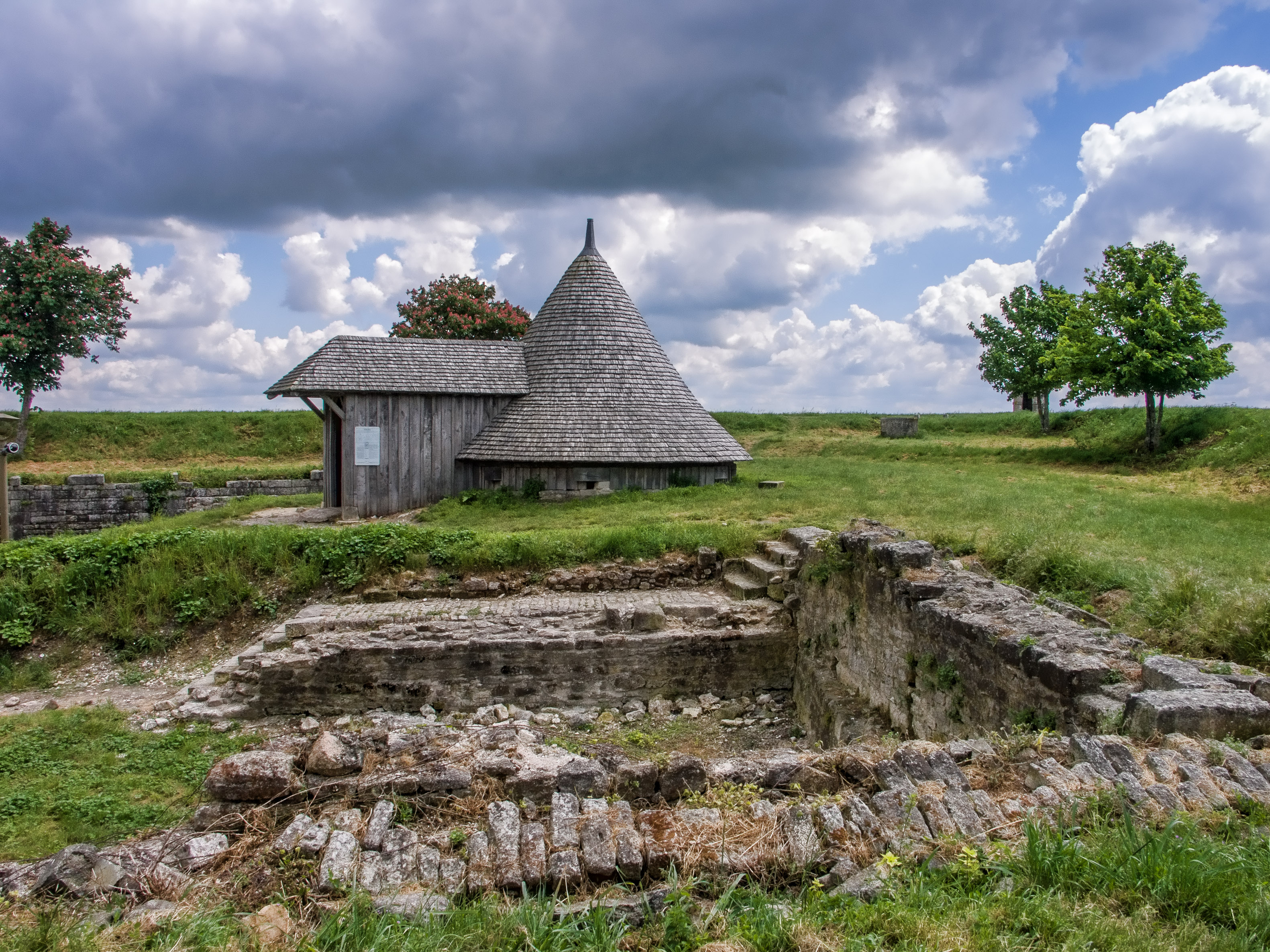 Glacière et ruines dans la citadelle de Brouage